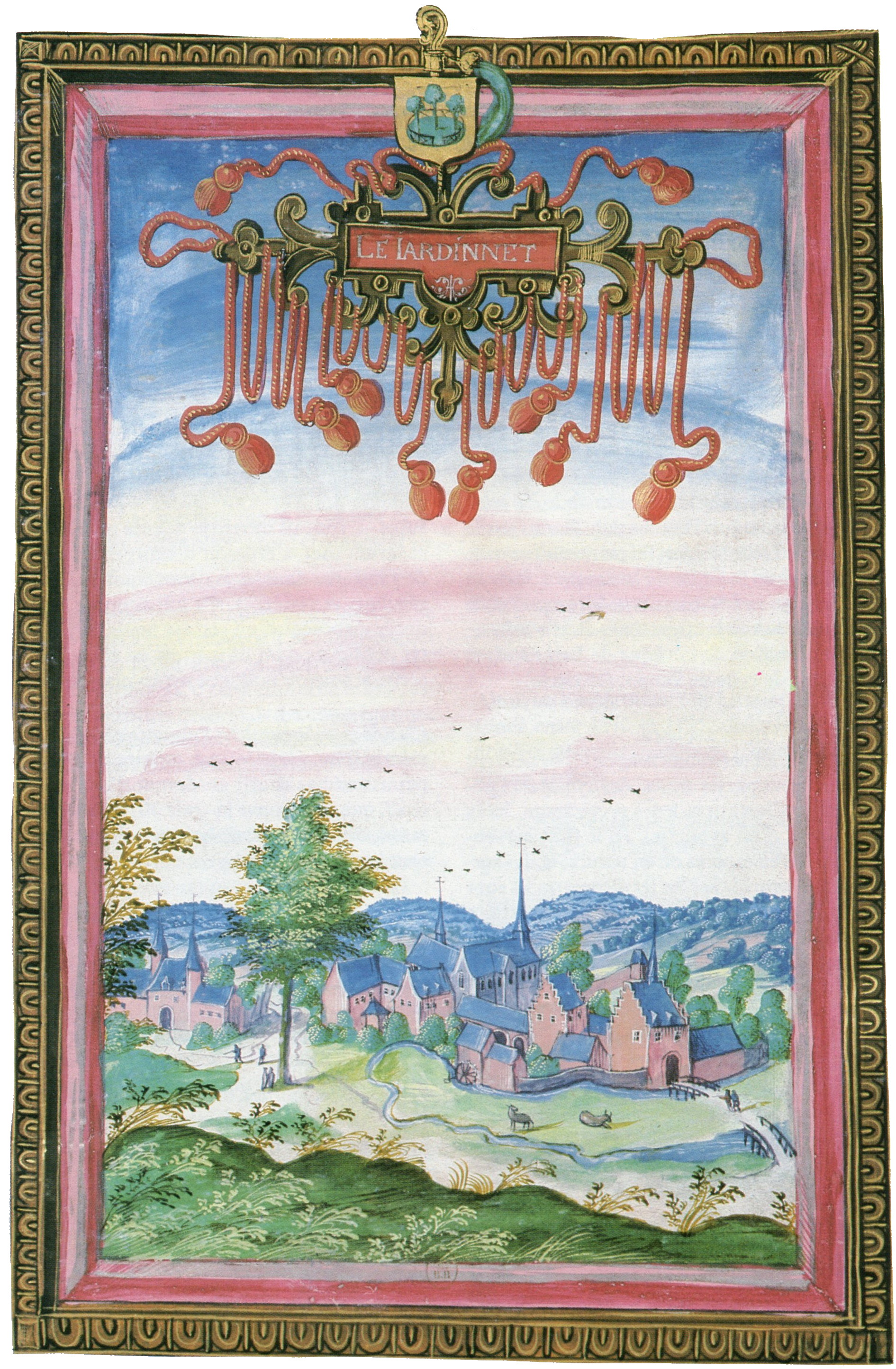 Abbaye du Jardinet à Walcourt en 1604. Albums de Croÿ, Paris, Bibliothèque nationale.